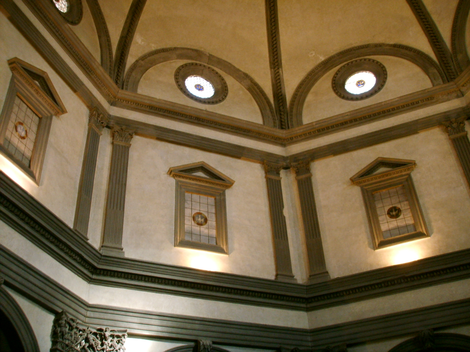 Santo Spirito, sagrestia di giuliano da sangallo